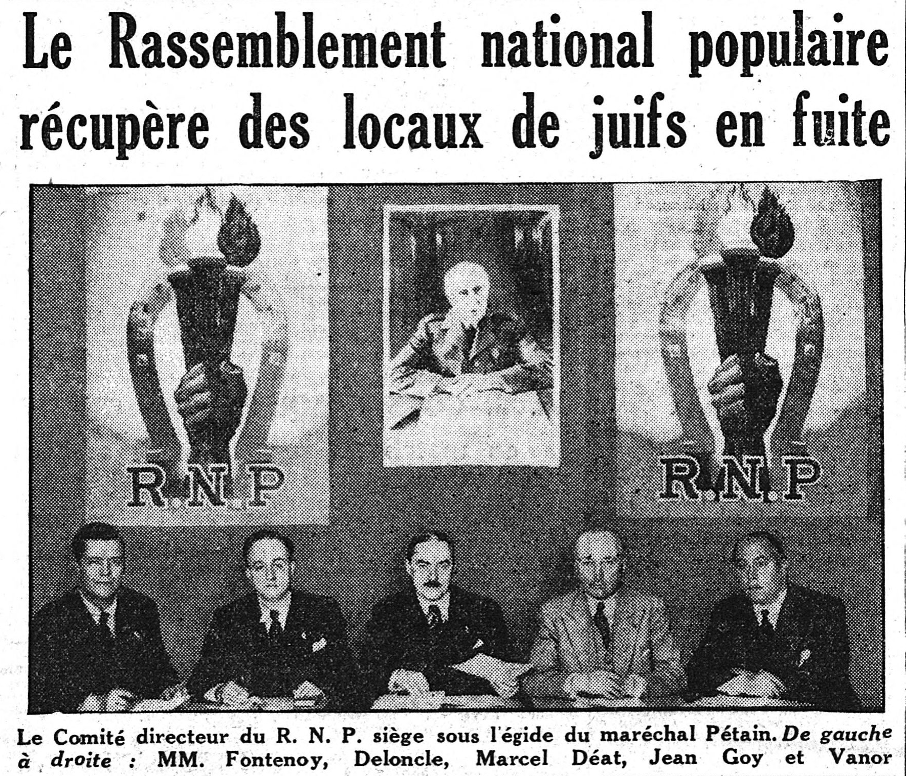 L'état-major du Rassemblement national populaire : Jean Fontenoy, Eugène Deloncle, Marcel Déat, Jean Goy et Jean Van Ormelingen (dit Jean Vanor). Extrait de la "une" du journal Le Matin, n° 20831, 10 avril 1941.